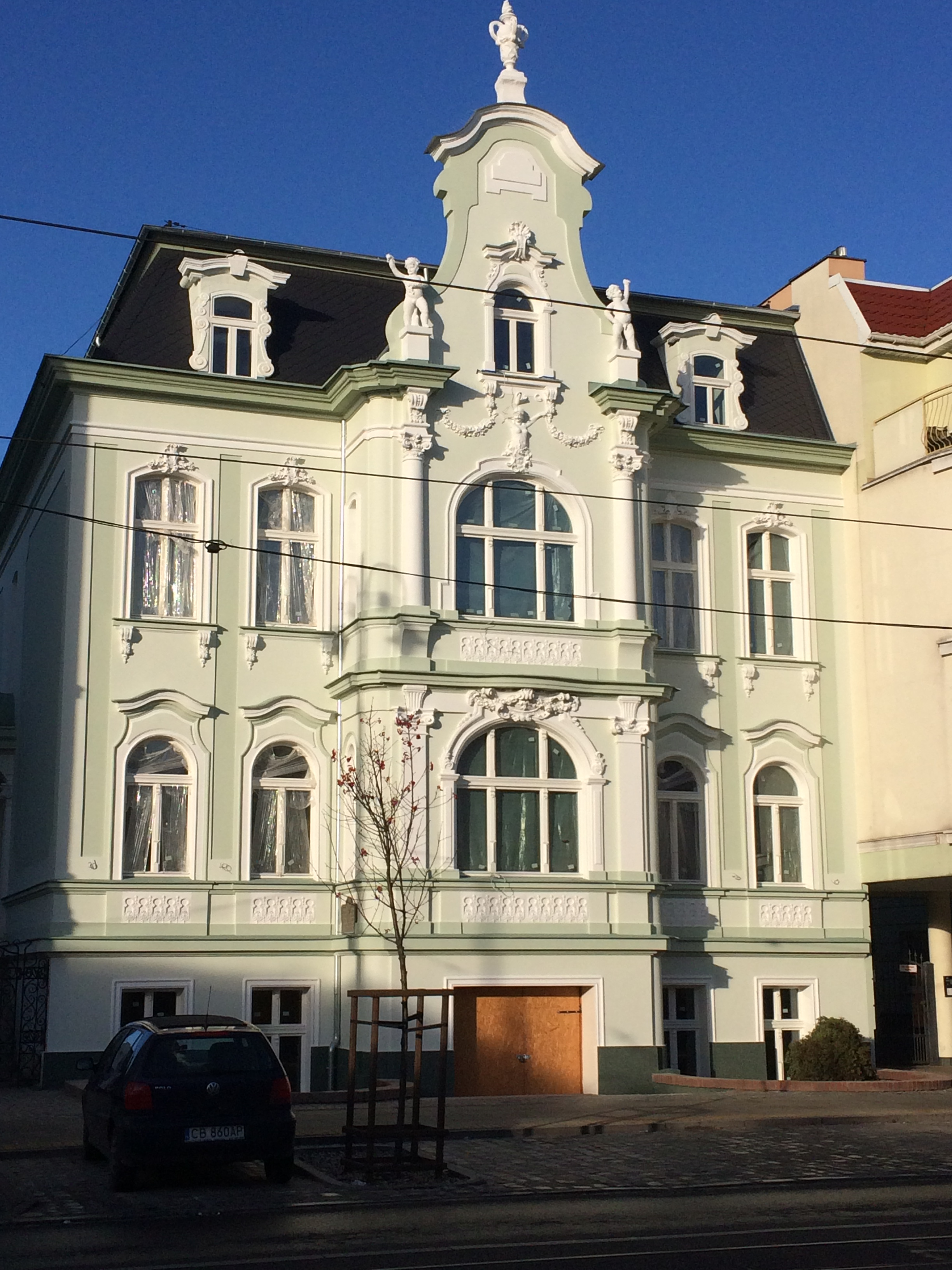 Kamienica przy ul. Gdańskiej 119 w Bydgoszczy, zbud. w 1896 r. wg proj. Fritza Weidnera